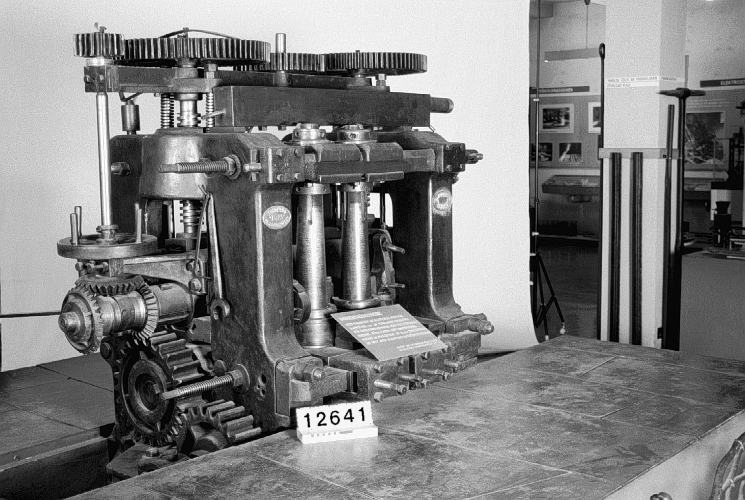 14" medium universal mediumvalsverk ebl. E. von Zweigbergk. Tillbehör: 2 st. stativ, övriga delar i 3 stora trälårar. PRODUKTION 1878 TILLVERKARE Morgårdshammars Mekaniska Verkstads AB KONSTRUKTÖR von Zweigbergk, E. ANVÄNDNING 1879 - 1935 BRUKARE Smedjebackens Valsverks AB GIVARE TILL MUSEET Smedjebackens Valsverks AB